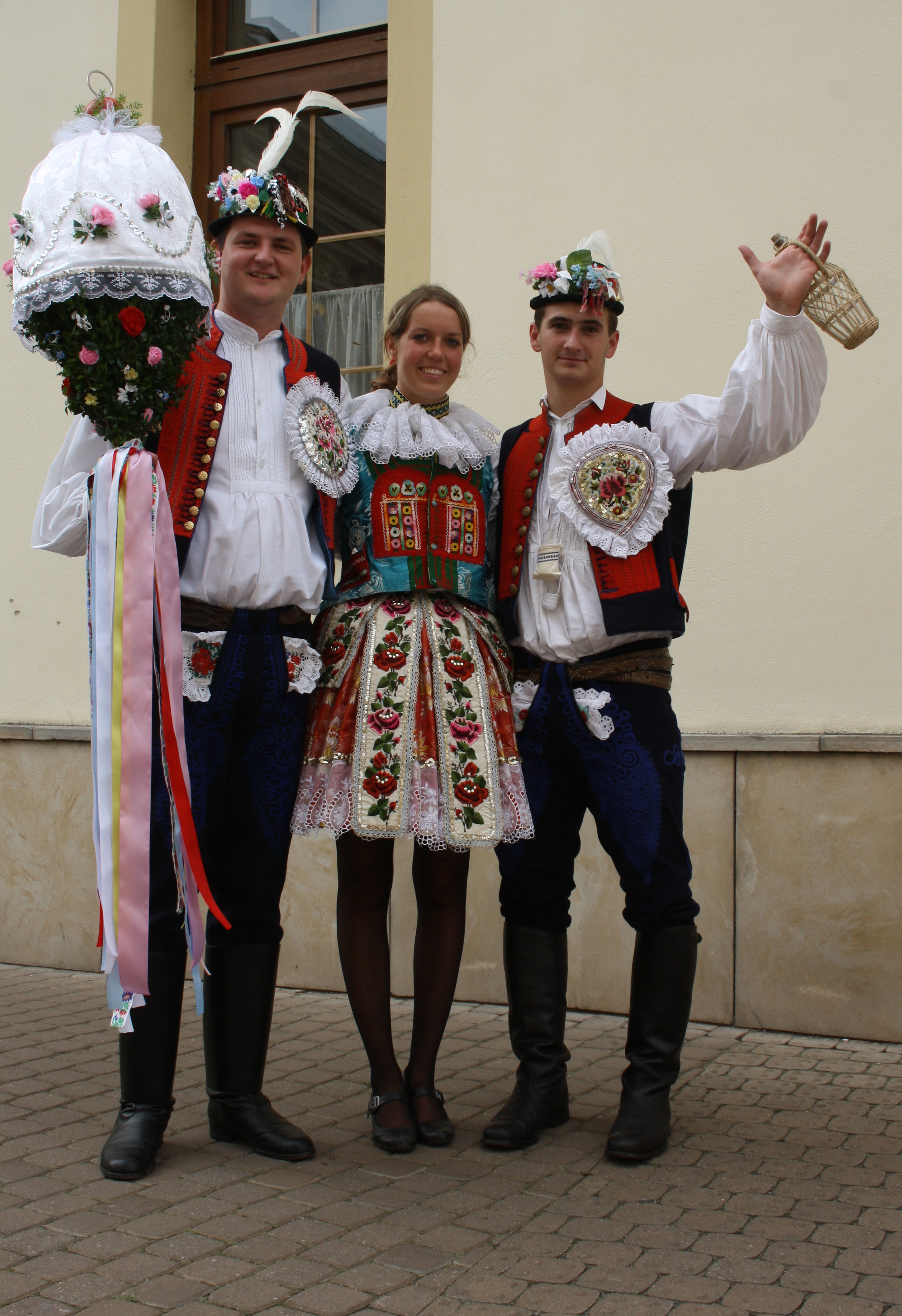 Pohled na přední část slavnostního kroje svobodných mládenců a svobodné dívky z Dolního Němčí. Vpravo stárek s velkým hodovým právem (Slovácké slavnosti vína a otevřených památek v Uherském Hradišti 2011).